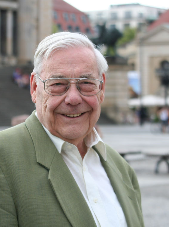 Walter J. Schütz, Berlin, Gendarmenmarkt, 2010